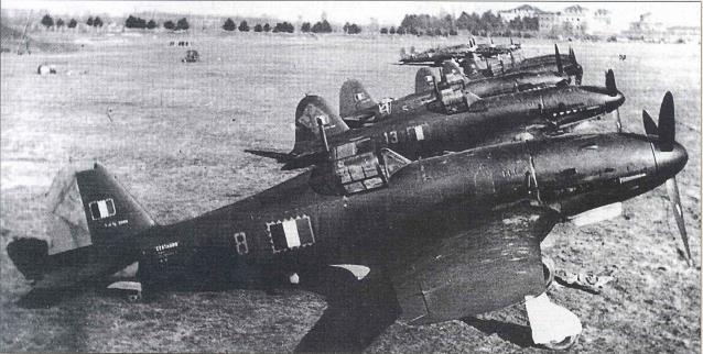 Fiat G.55 in rassegna Licensing Categoria:Immagini di aeroplani